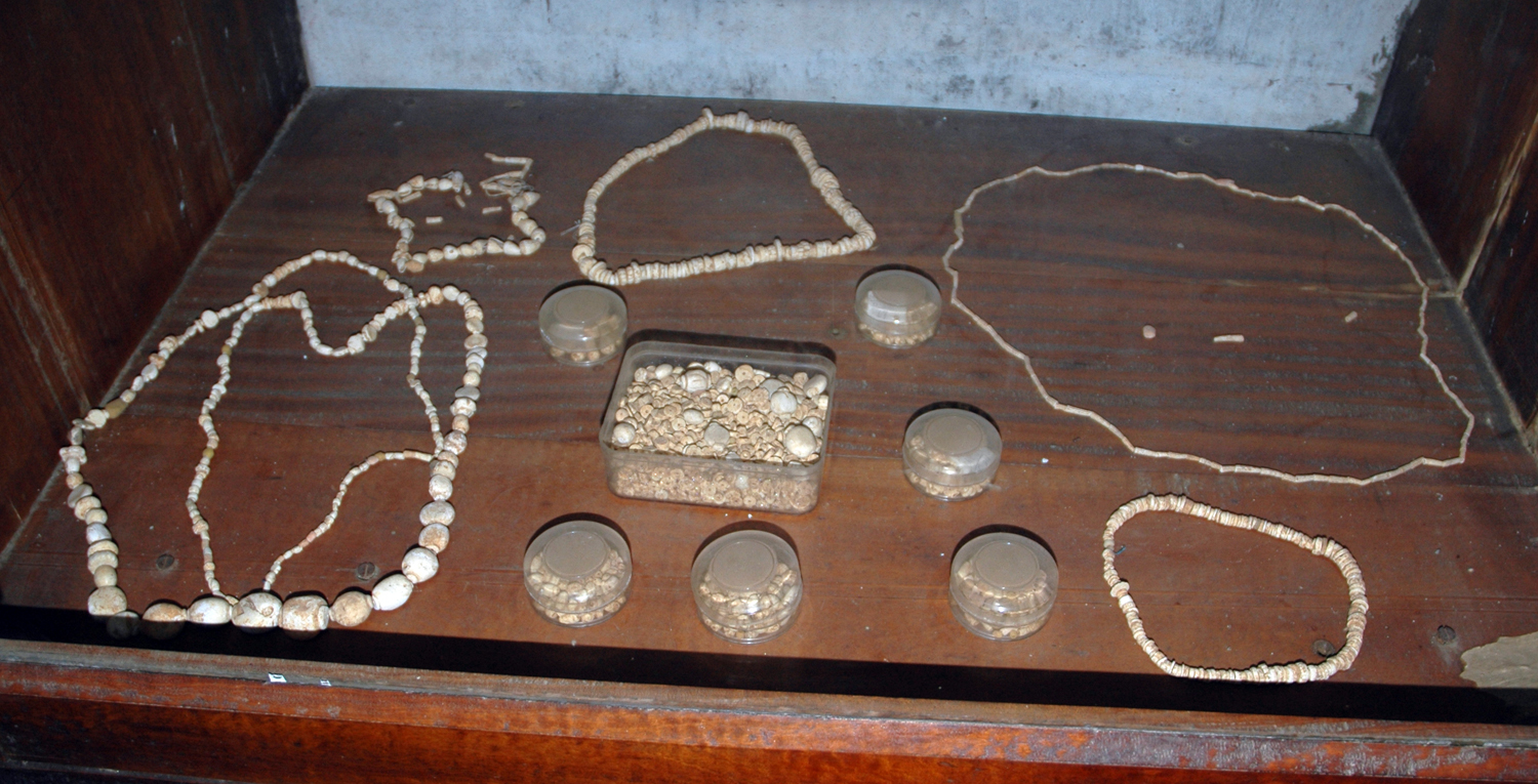 சங்கு மாலைகள் - தொல் பொருட்காட்சிச்சாலை, யாழ்ப்பாணம்